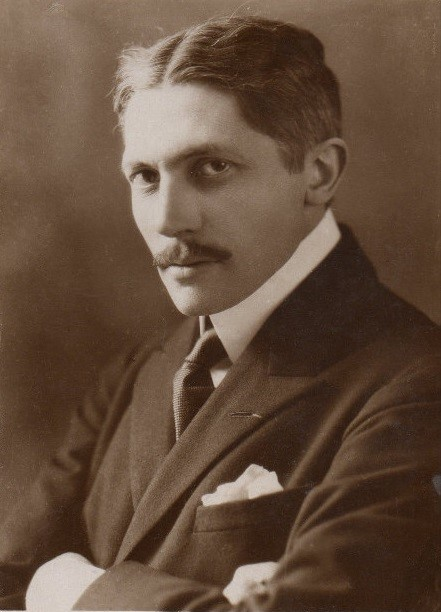 Jacques Bainville photographié par Frédéric Boissonnas.